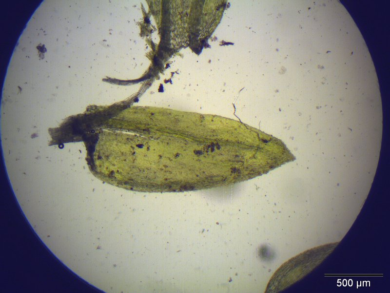 Ufer-Schnabeldeckenmoos (Rhynchostegium riparioides bzw. Platyhypnidium riparioides), Blatt, Vergrößerung: 40x